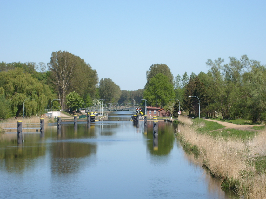 Schleuse des Elbe-Lübeck-Kanals